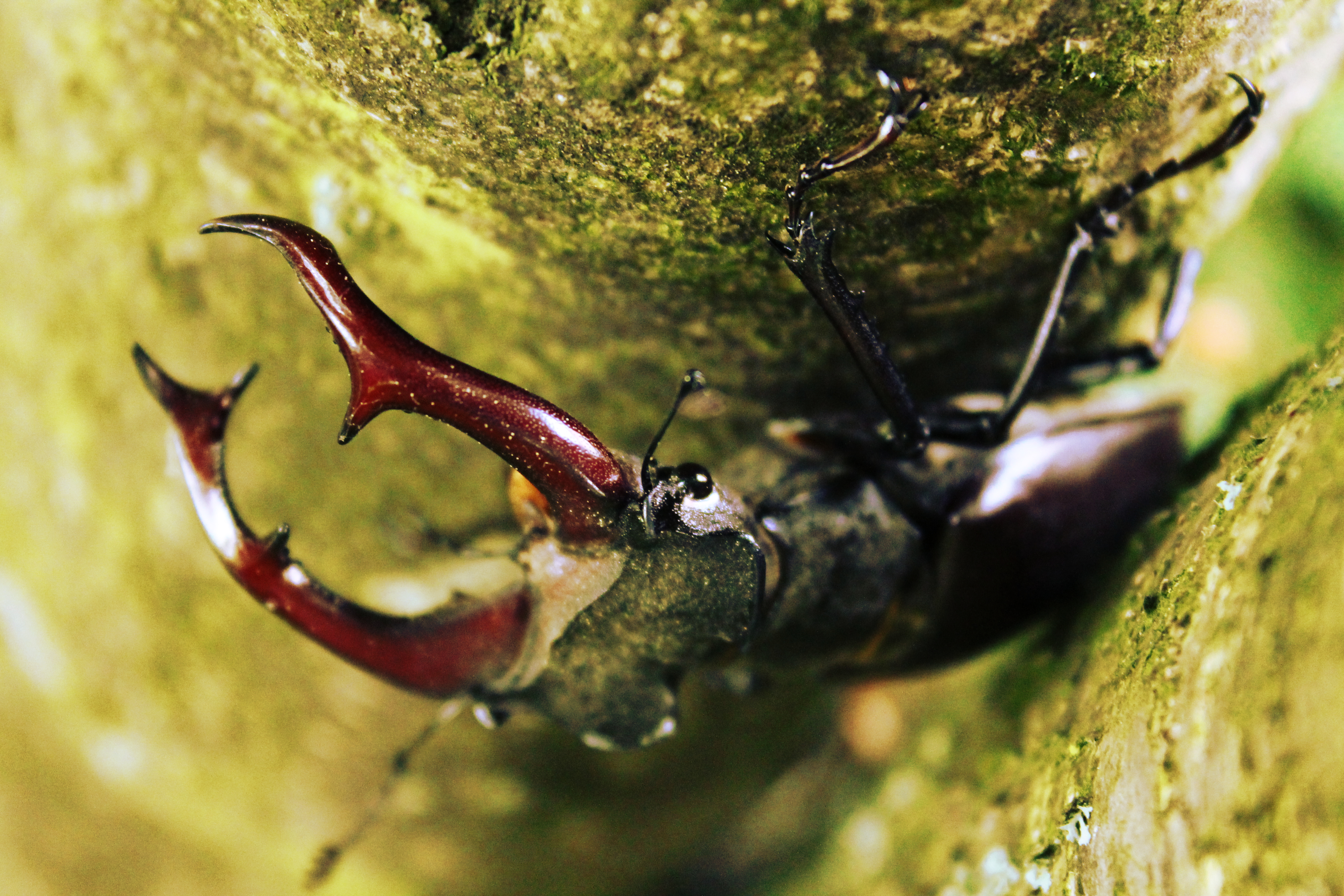 Nahaufnahme eines Hirschkäfers mit gut sichtbarem Auge.